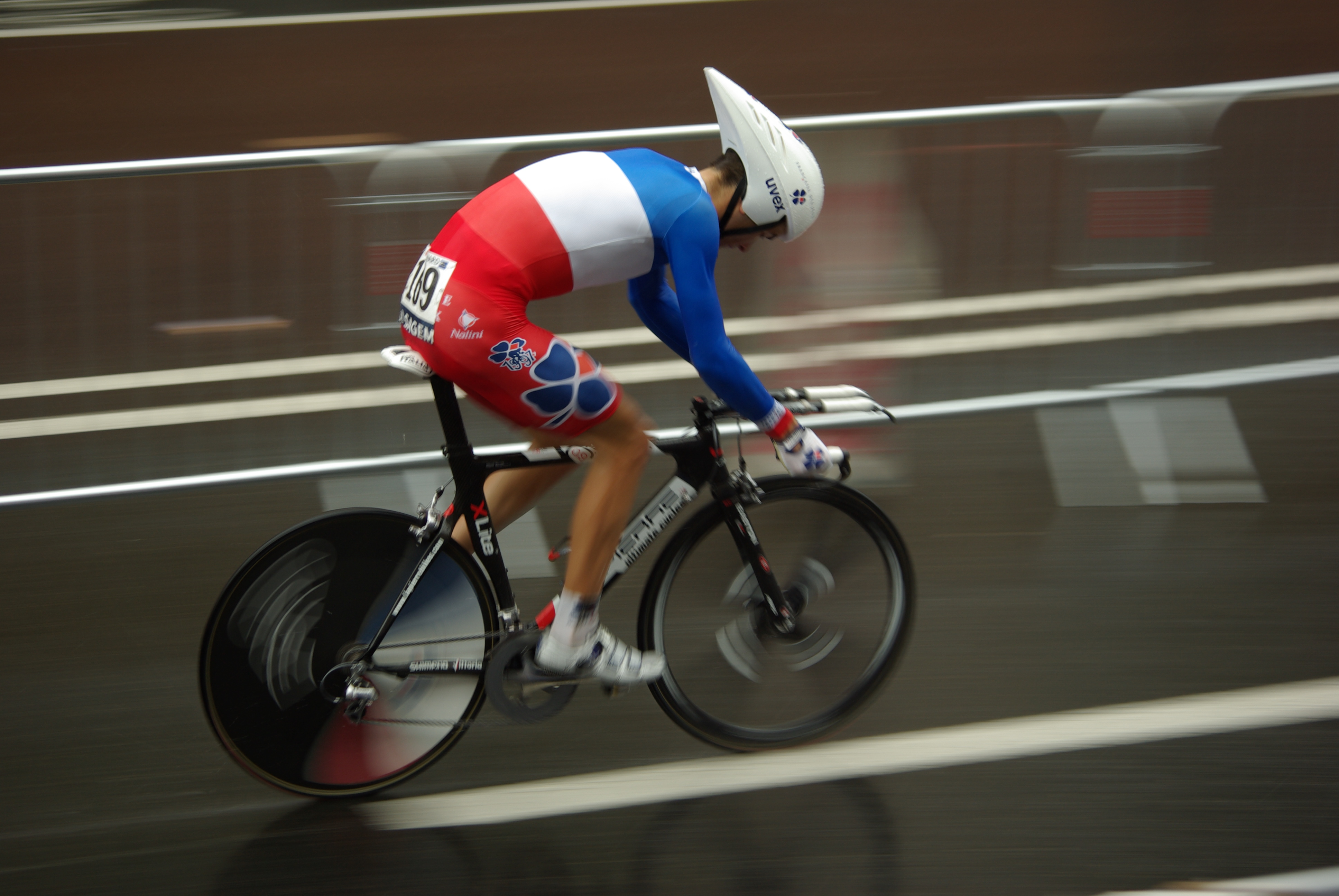 Benoît Vaugrenard (Tour de France 2007, 13e etappe).